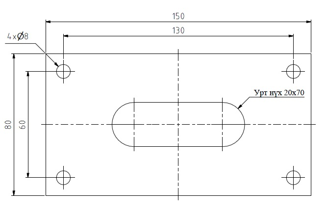 Монгол: Урт нүх